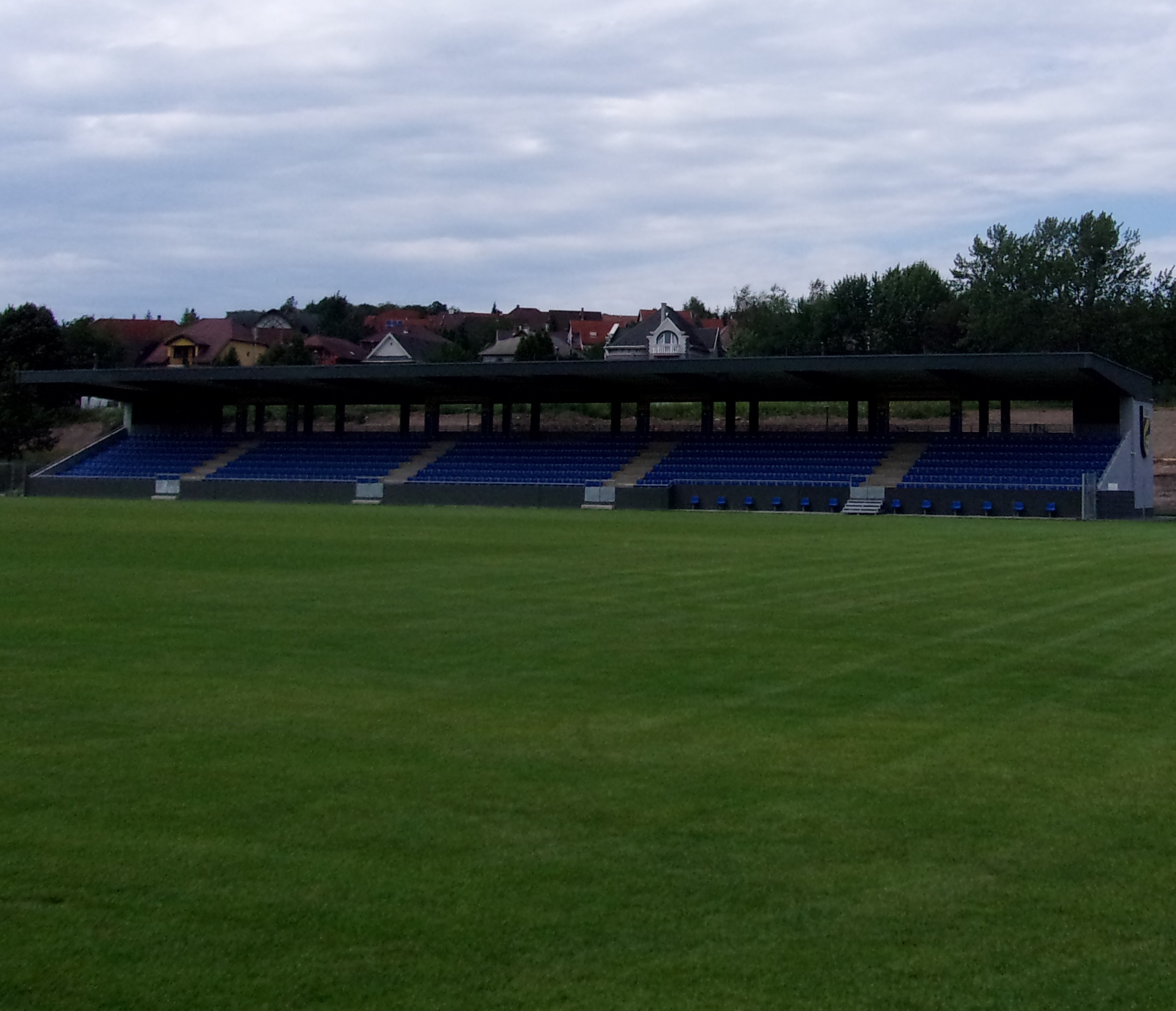 A Kolorcity Kazincbarcika SC stadionjának lelátója 2020-ban